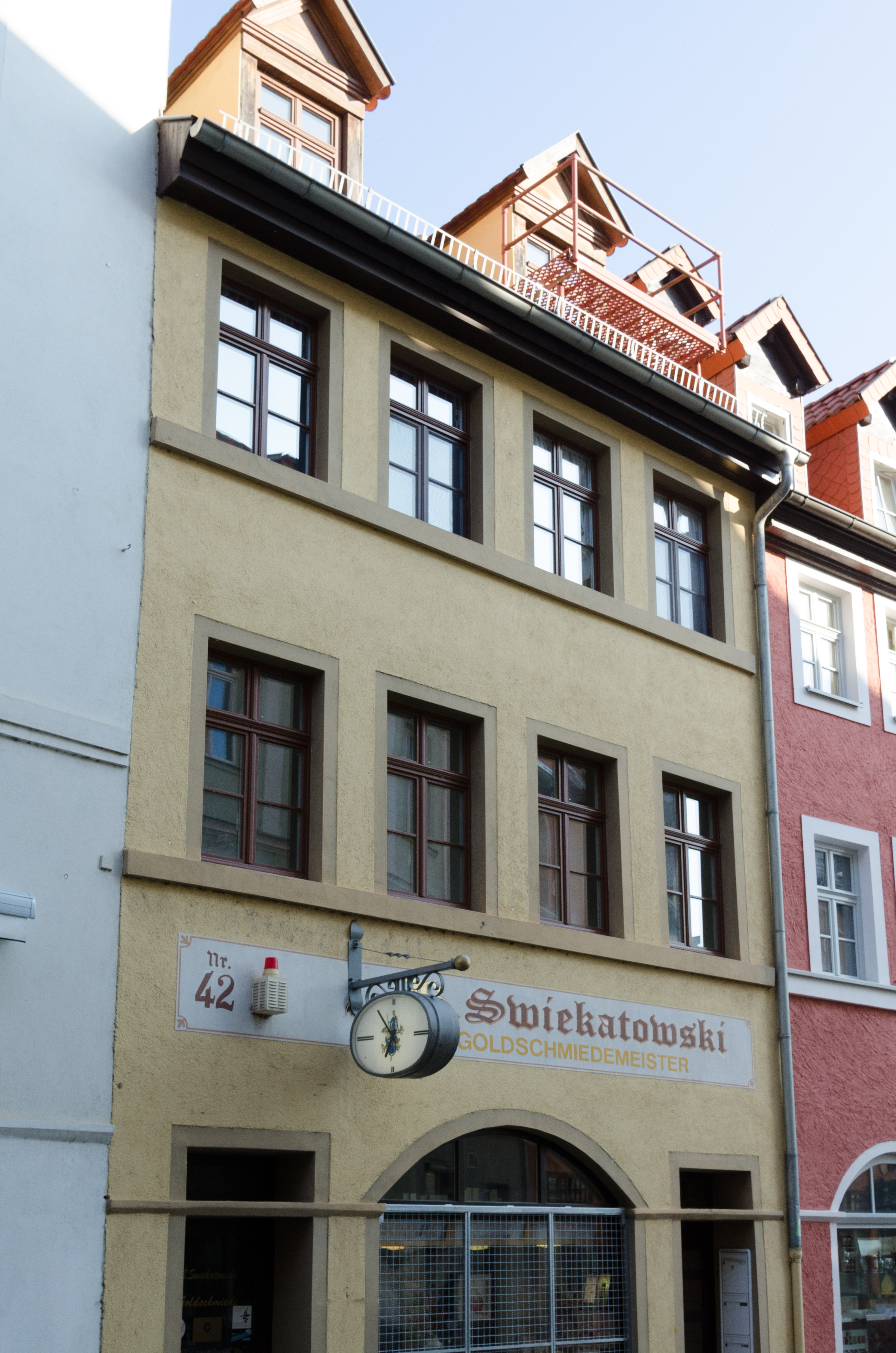 Naumburg, Salzstraße 42